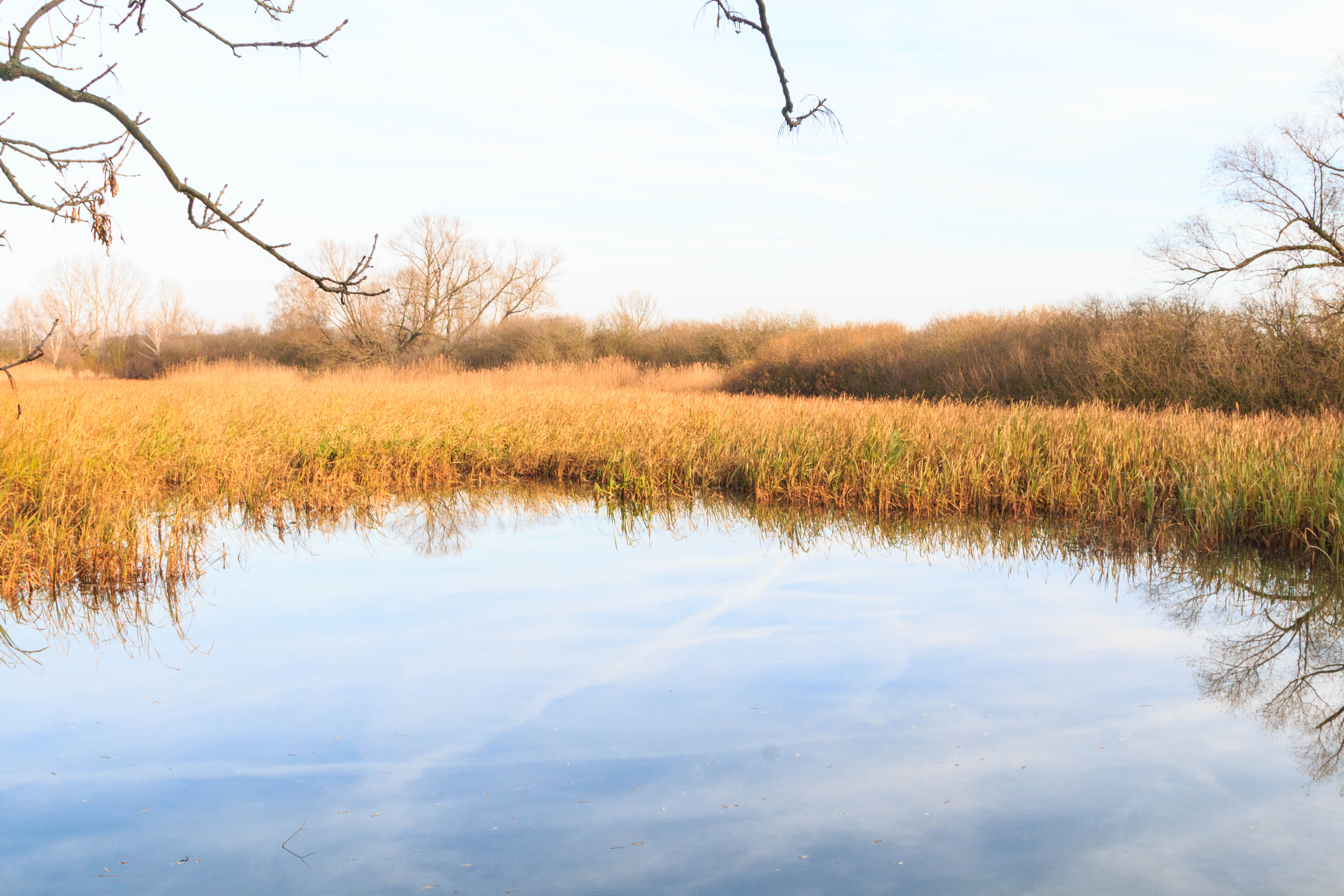 rybník Beránek u Volče Project: Vodstvo.